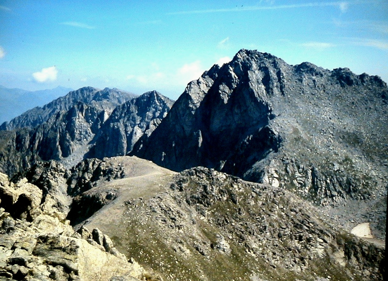 Pic i coll de Peguera des del pic de Mar, a Cabdella. La Torre de Cabdella (Pallars Jussà - Catalunya). Foto presa de la projecció d'una diapositiva.